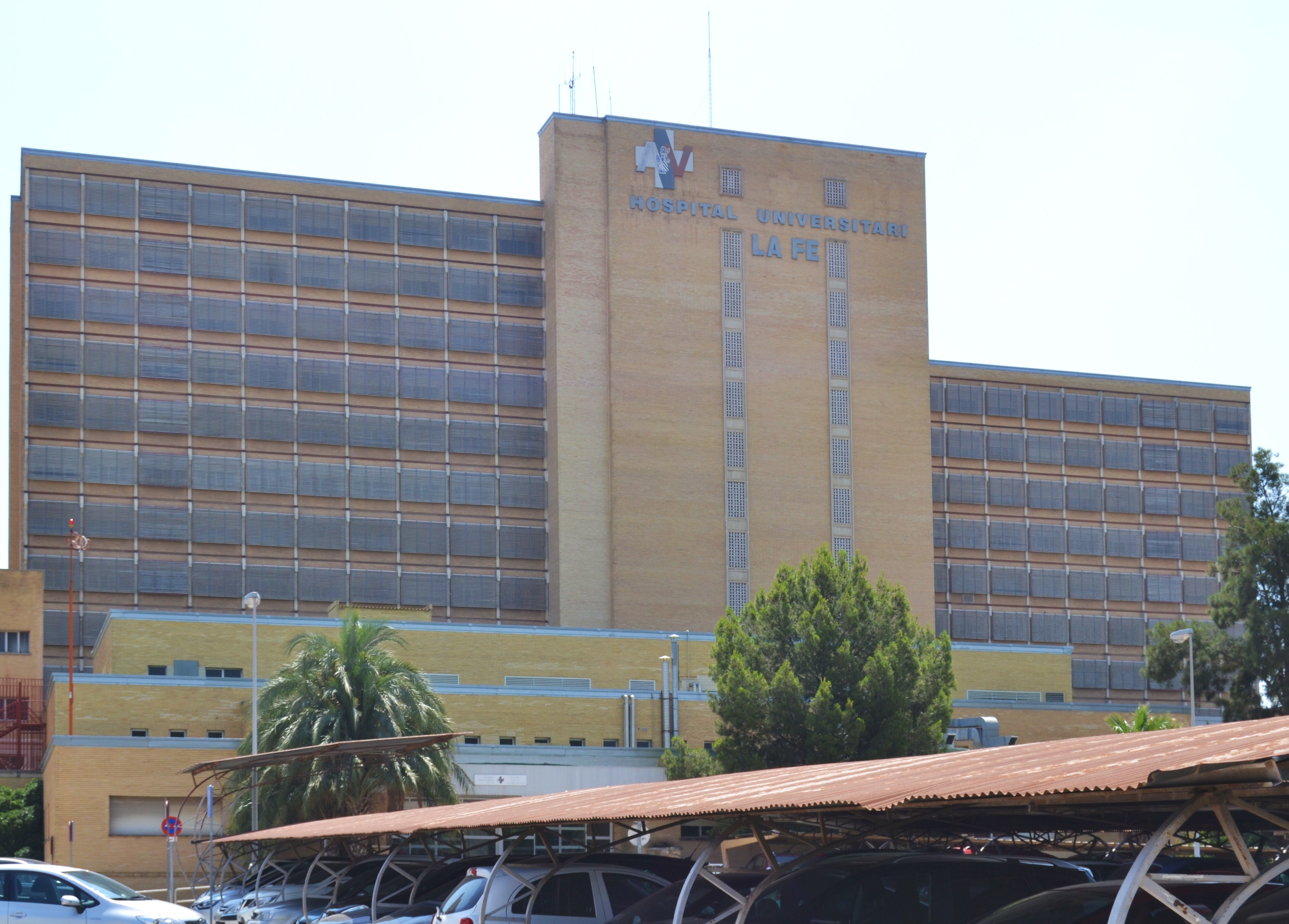 Edifici central de l'hospital de La Fe, València.